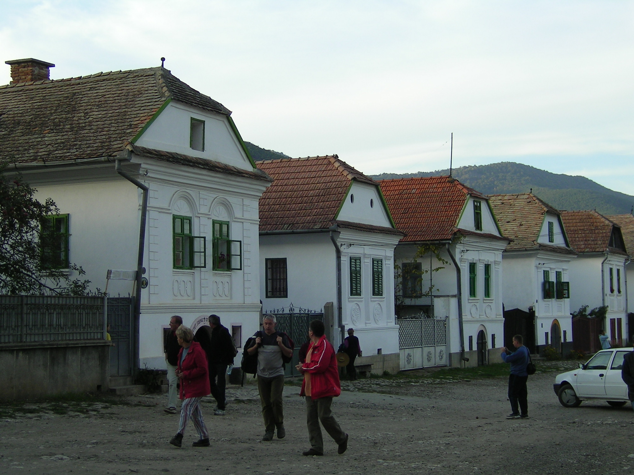 Rimetea, case din centrul istoric.